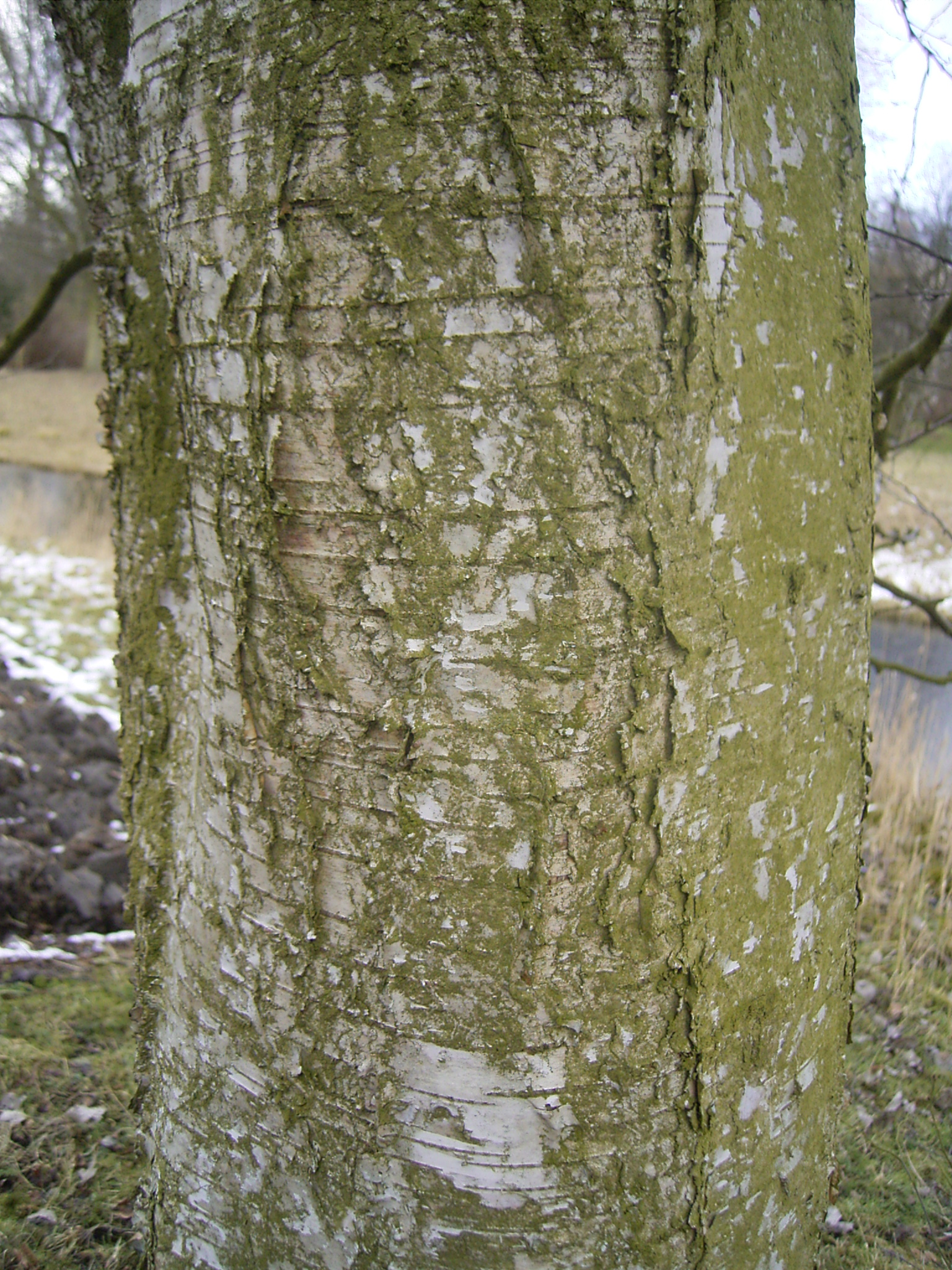 Deze foto toont de schors van Betula pubescens. Ik nam de foto op 2 maart 2006 in het heempark in Delft. This pic shows the bark of Betula pubescens.